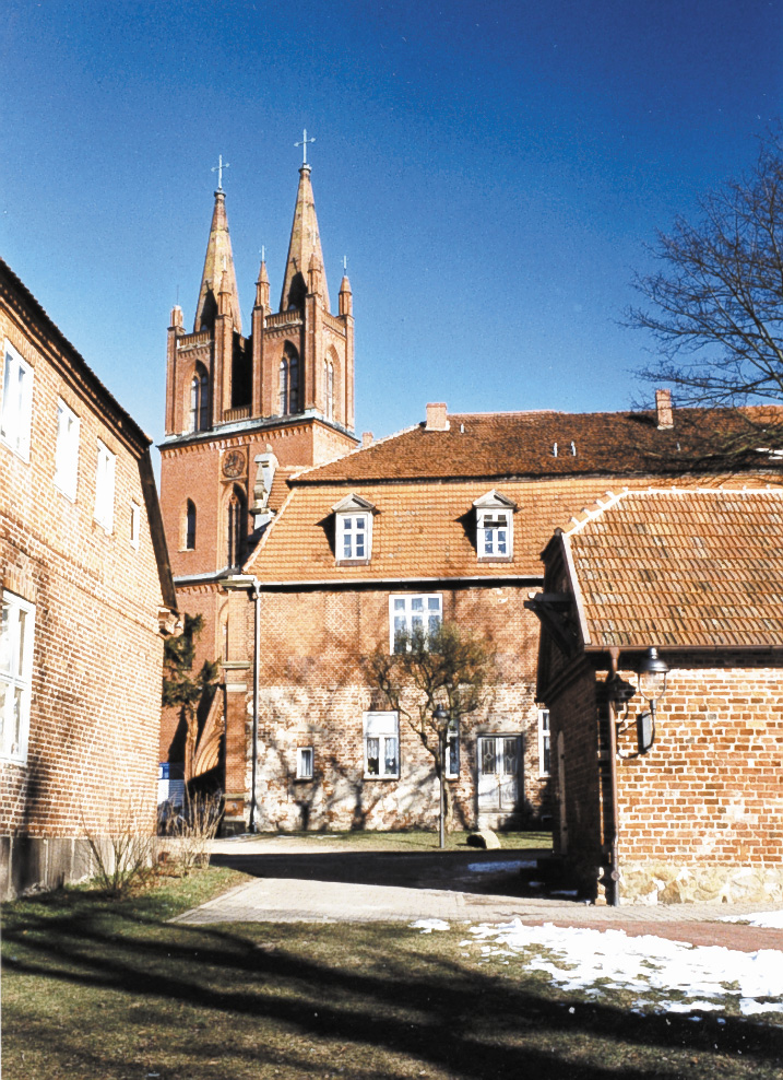 Blick auf die Kirche von Kloster Dobbertin